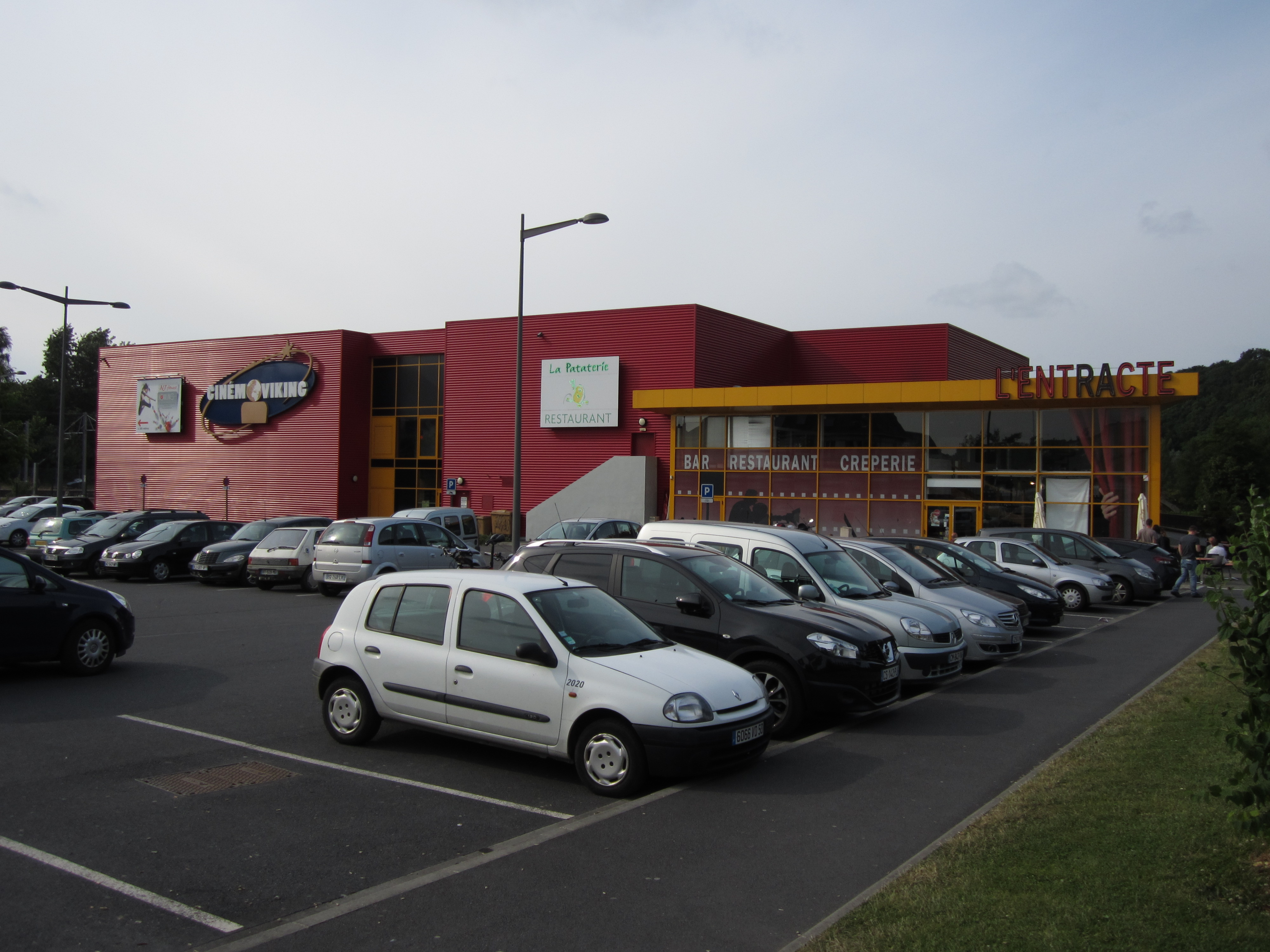 Cinéma de Saint-Lô